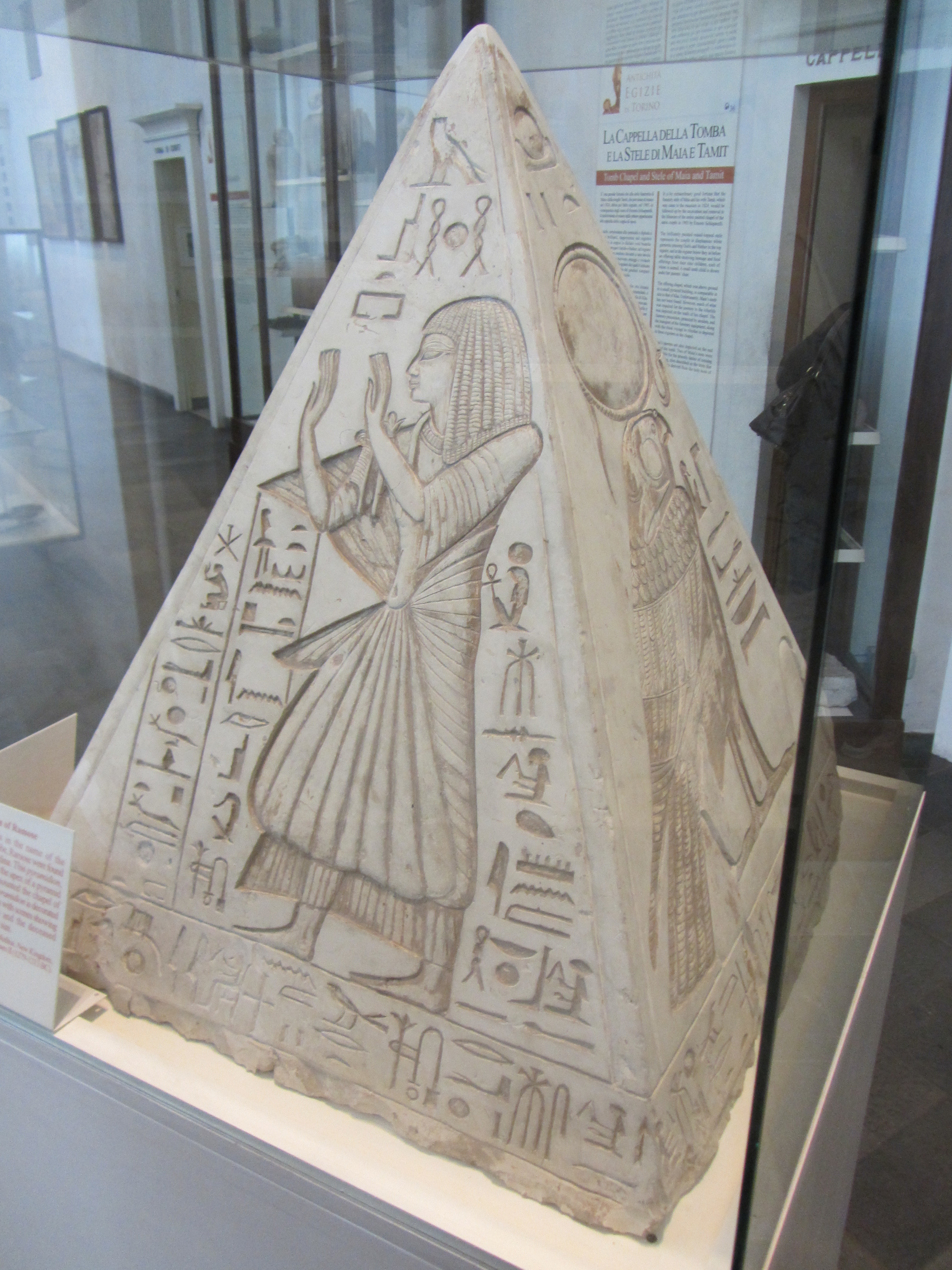 piramide con rilievo, Museo Egizio Torino